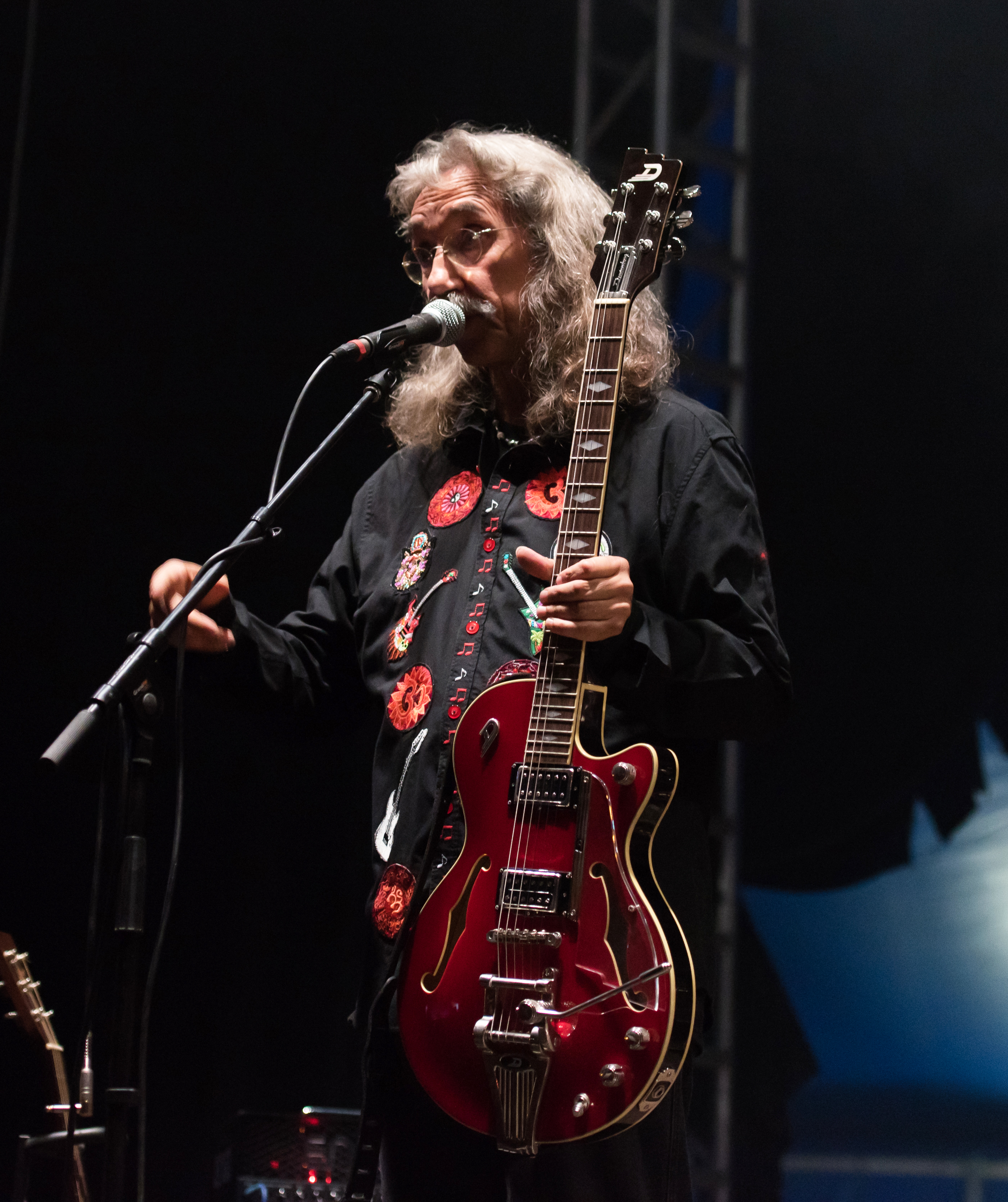 Peter Bursch beim Werner Rennen 2018